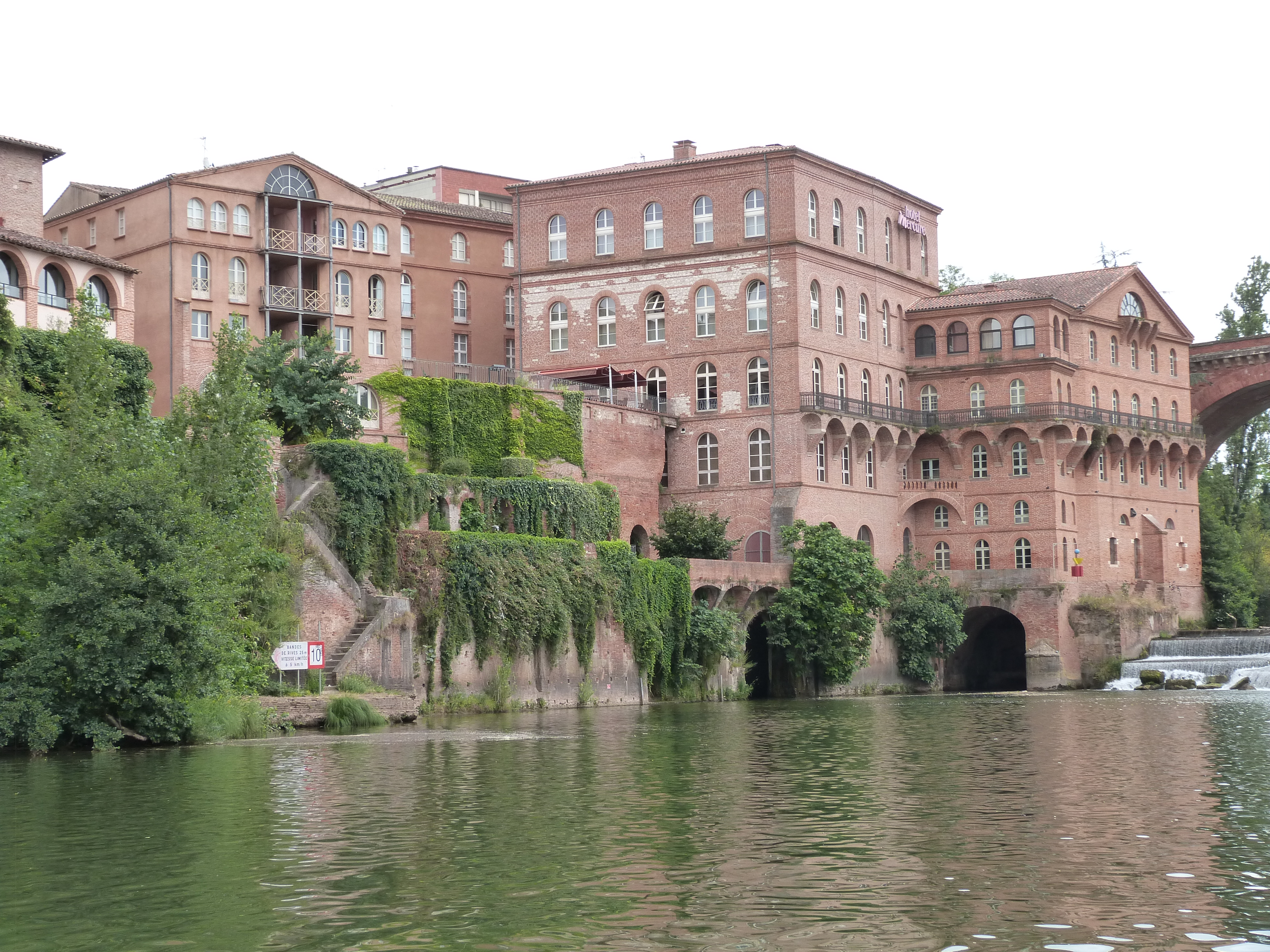 L'ancienne vermicellerie connue sous le nom de Moulins Albigeois se trouve sur la rive droite du Tarn à Albi, en aval du pont neuf.